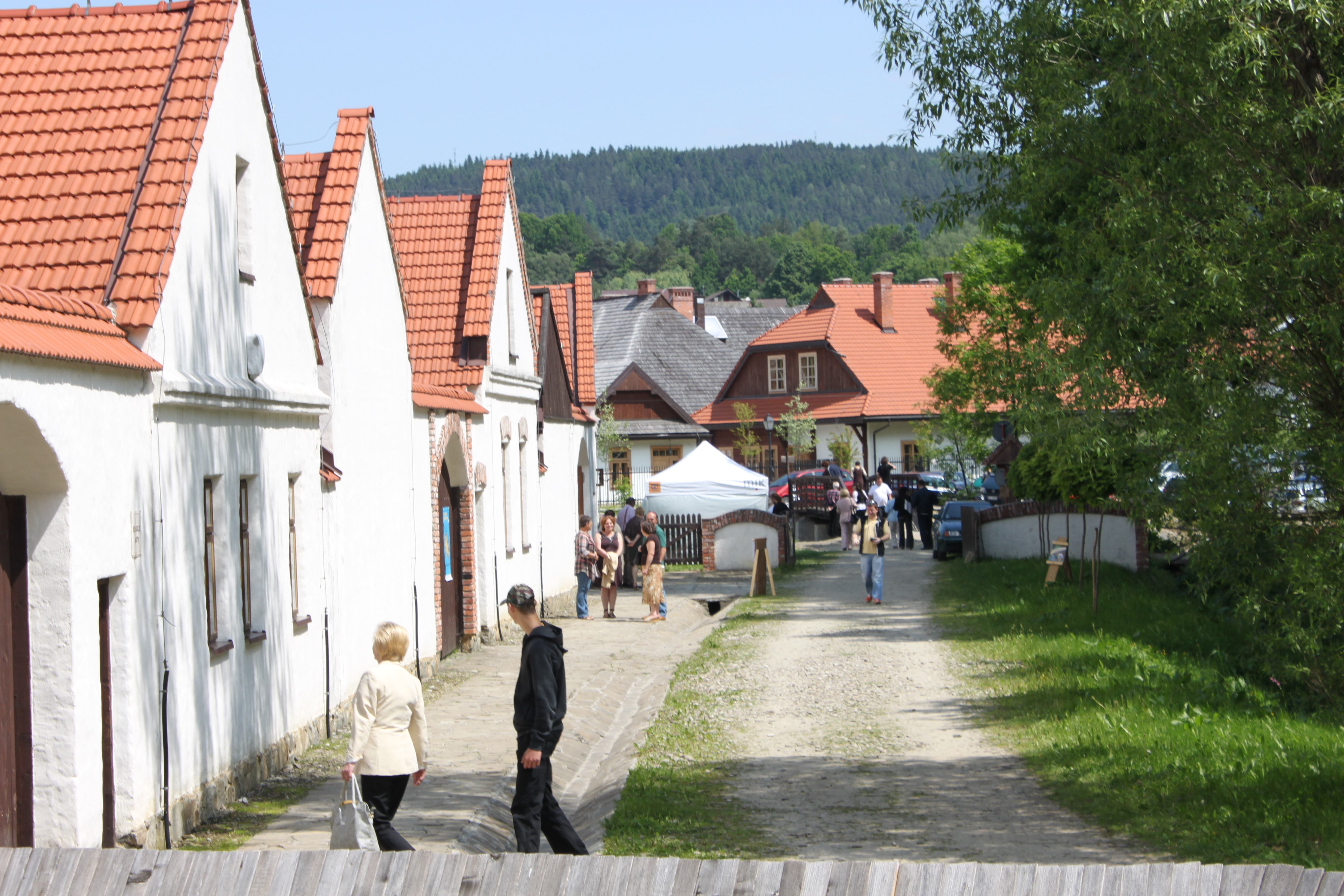 Muzeum Okręgowe w Nowym Sączu XIV Małopolskie Dni Dziedzictwa Kulturowego, 26-27 maja 2012 fot. P. Hłyń